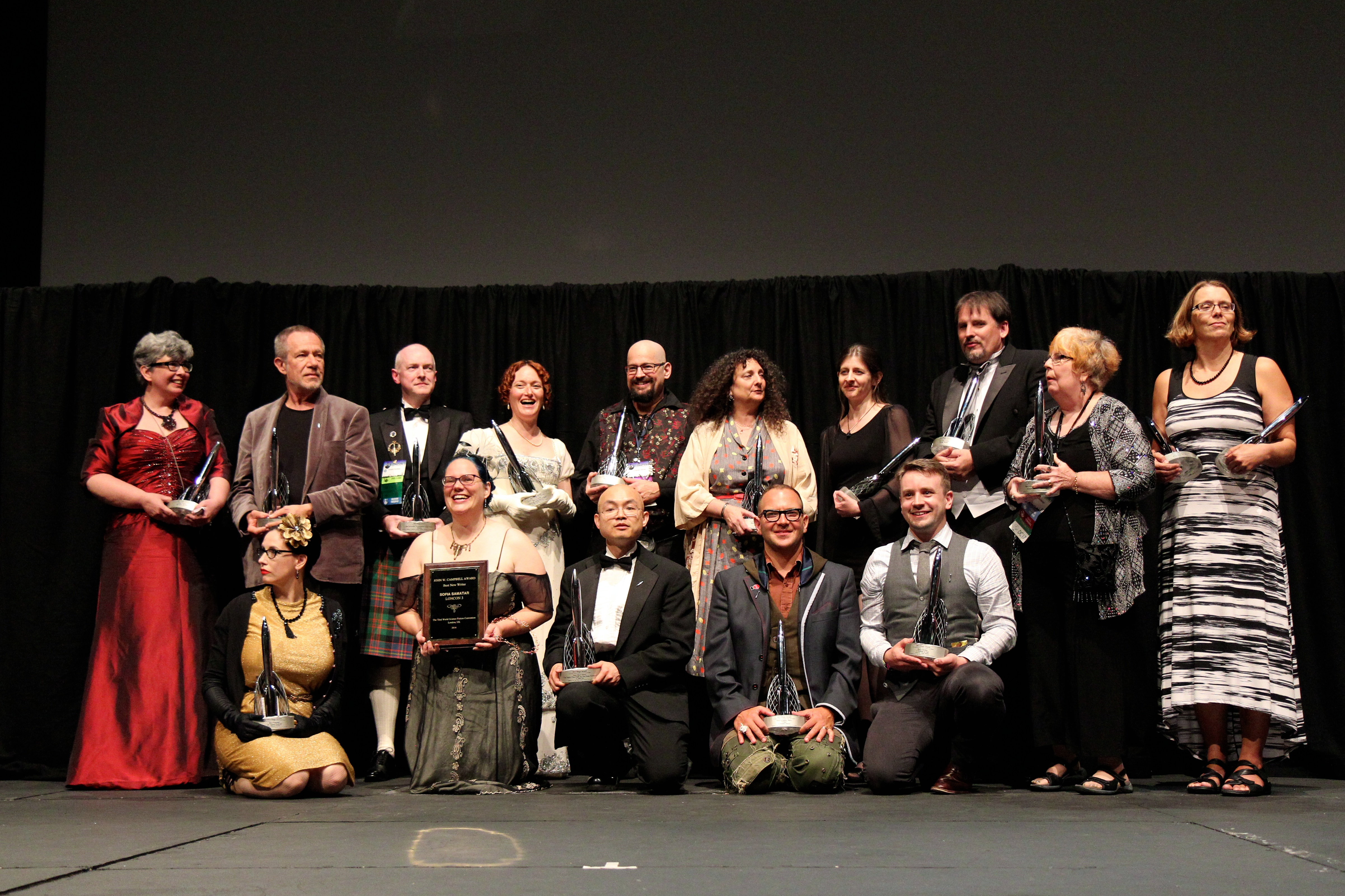 Hugo Award 2014.